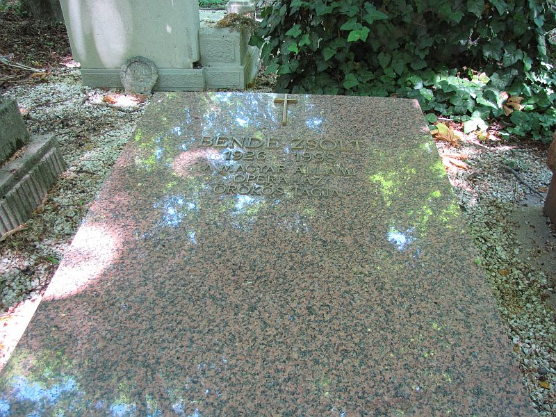 Bende Zsolt (Bp., 1926. máj. 23.– 1998.) énekes (bariton) sírja Budapesten. Farkasréti temető: 1-2-154